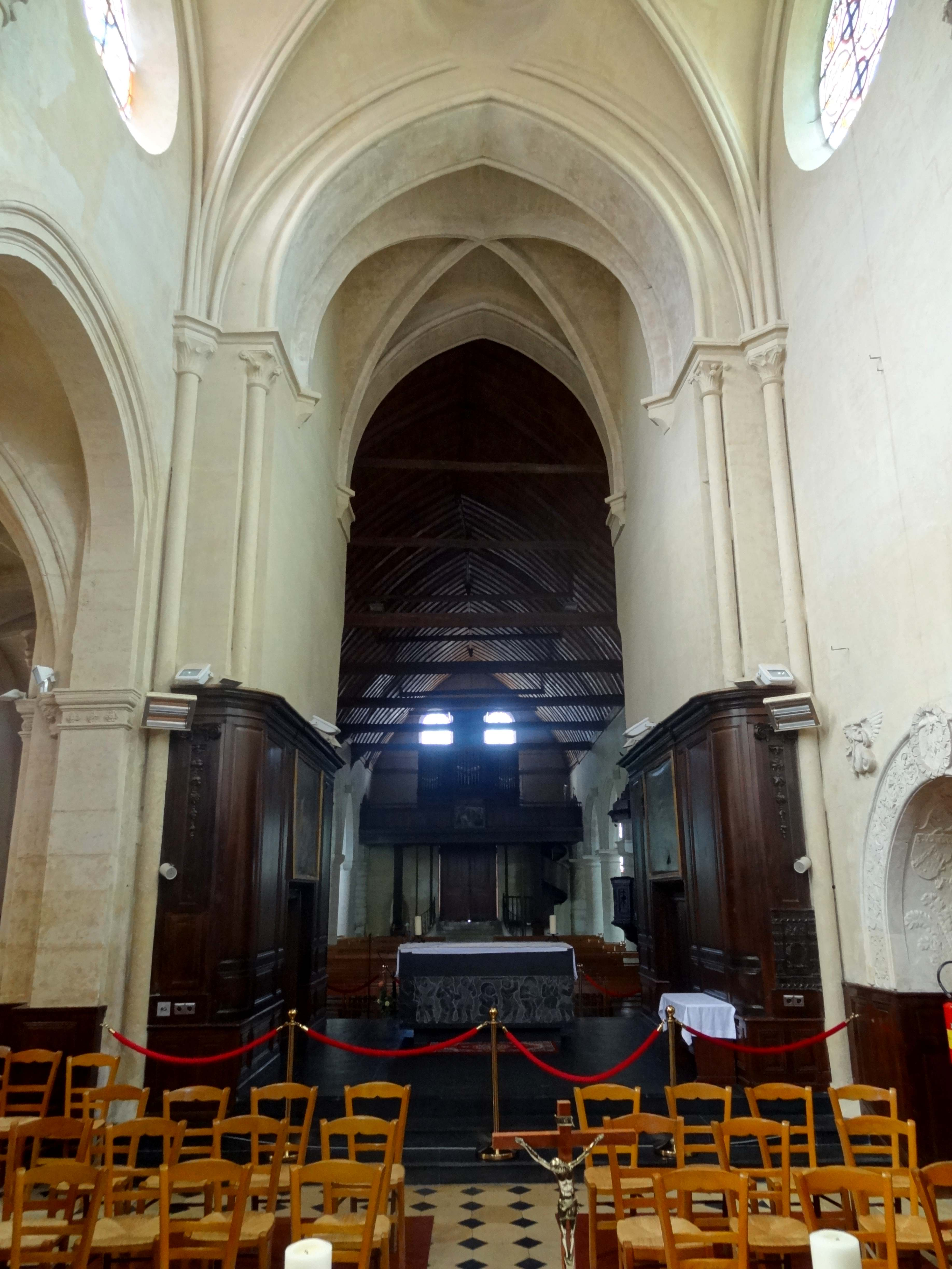 Intérieur de l'église - voir titre.